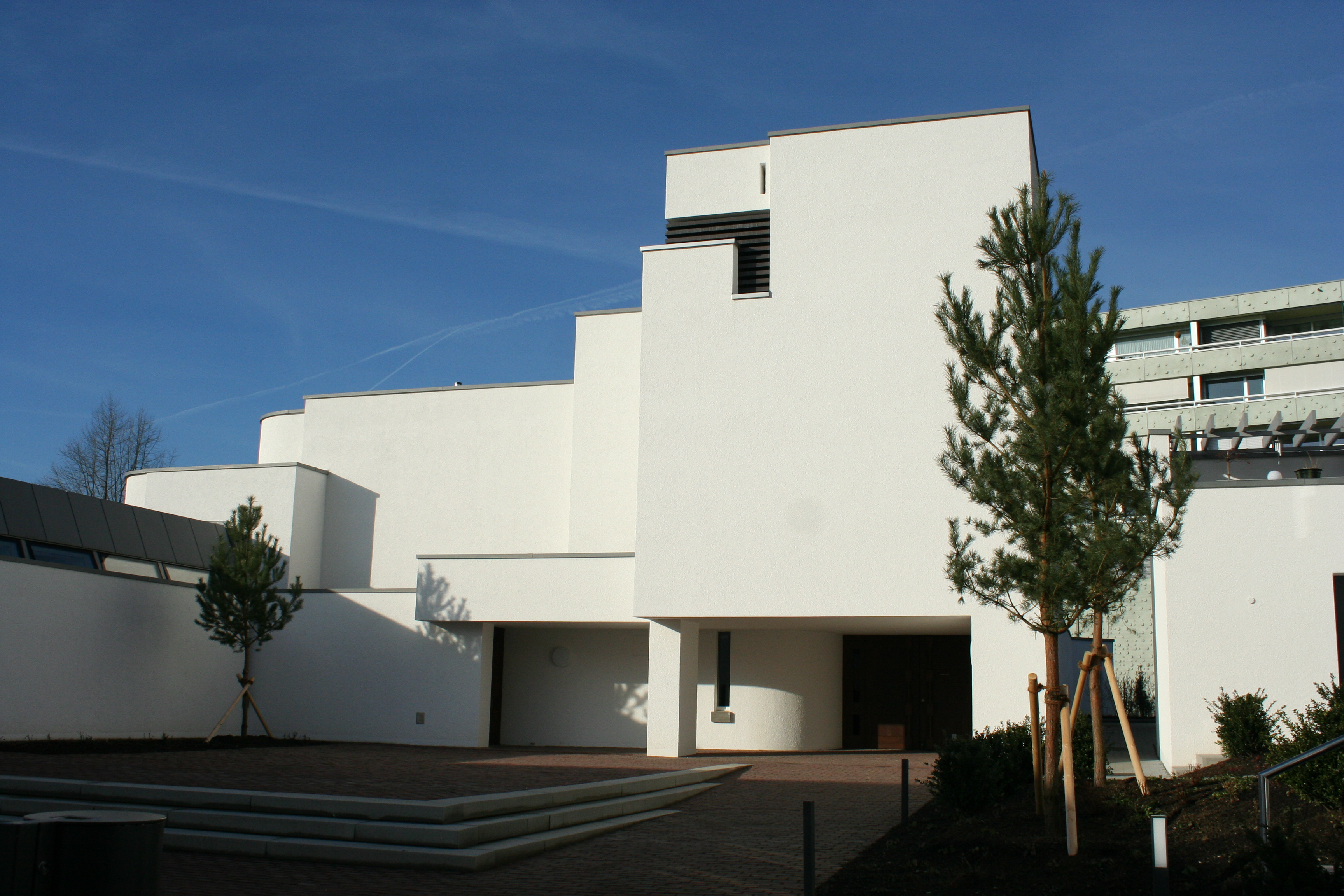 Römisch-katholische Pfarrkirche St. Ulrich Winterthur-Rosenberg, Kirchturm im Innenhof